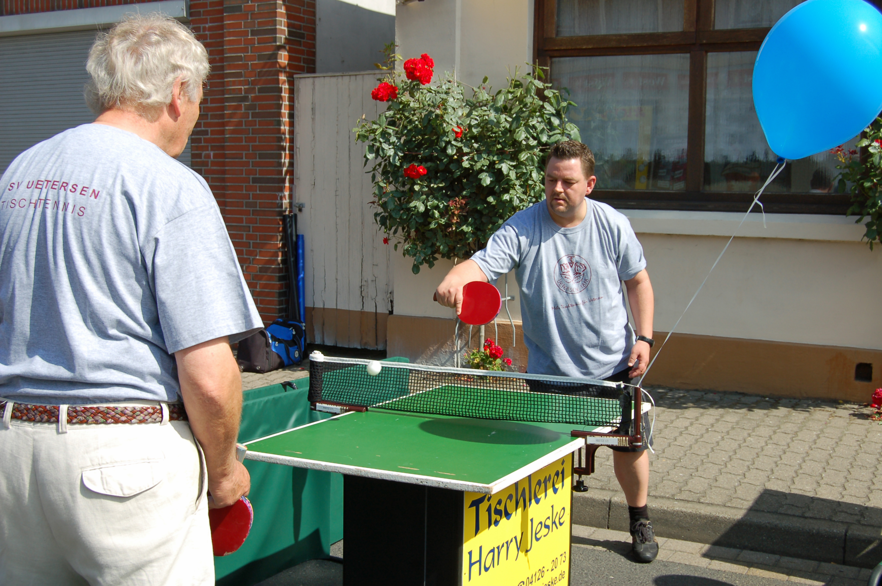 Die Tischtennis Sparte des TSV Uetersen bei einer Vorführung anlässlich der 775-Jahr-Feier der Stadt.